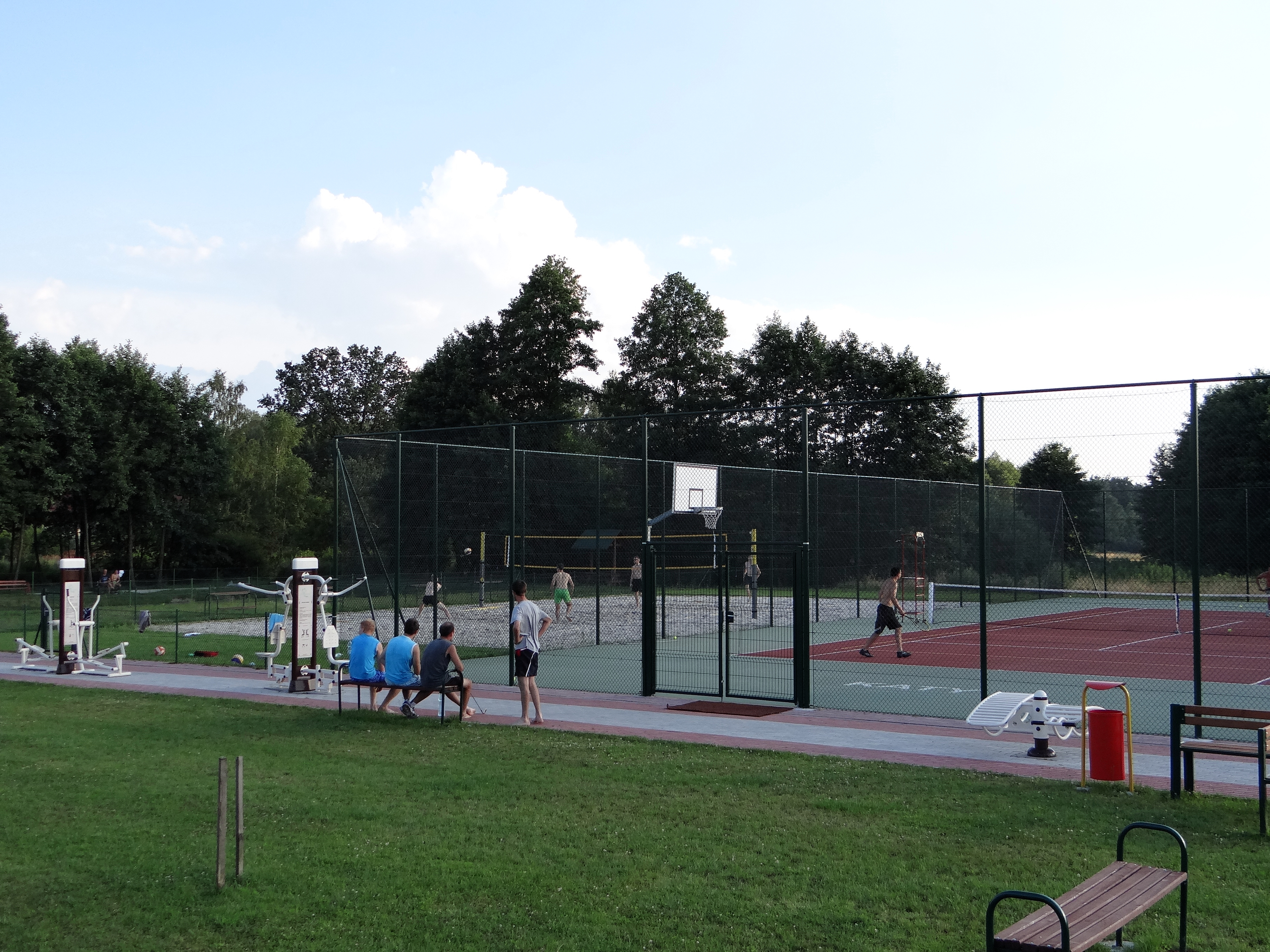 Katy - kompleks sportowo-rekreacyjny